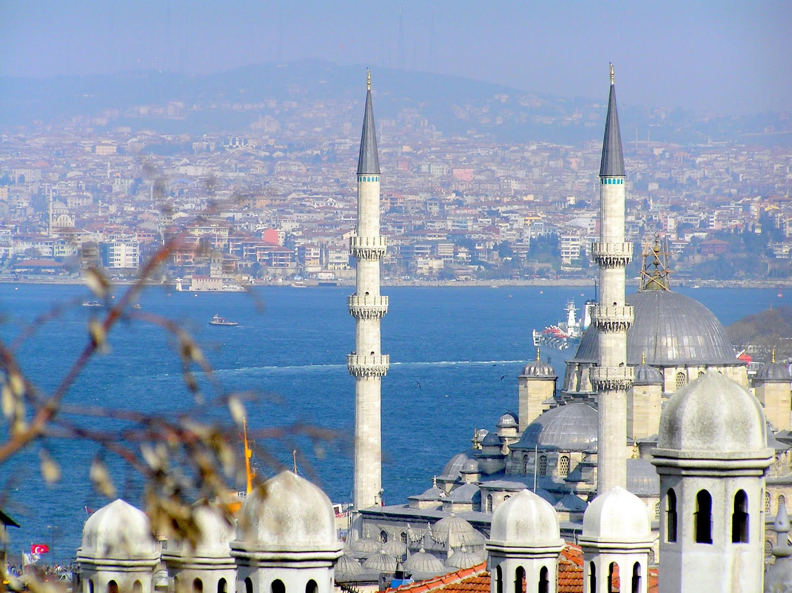 スルタンアフメト・モスクとボスポラス海峡の眺め。2007年4月上旬撮影。